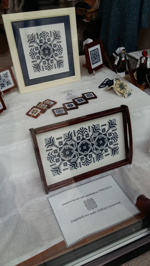 Zmijanje embroidery in store in Banja Luka